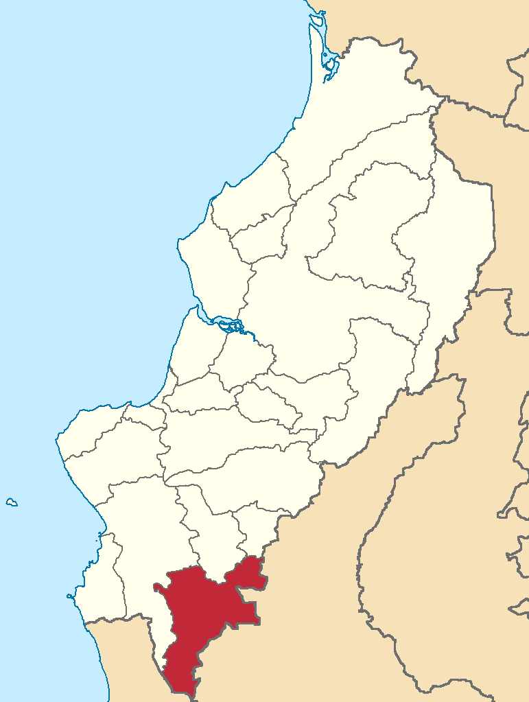 Mapa localizador del cantón en Manabí, Ecuador